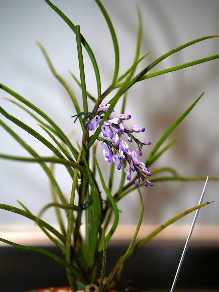 Schoenorchis juncifolia Deep blue